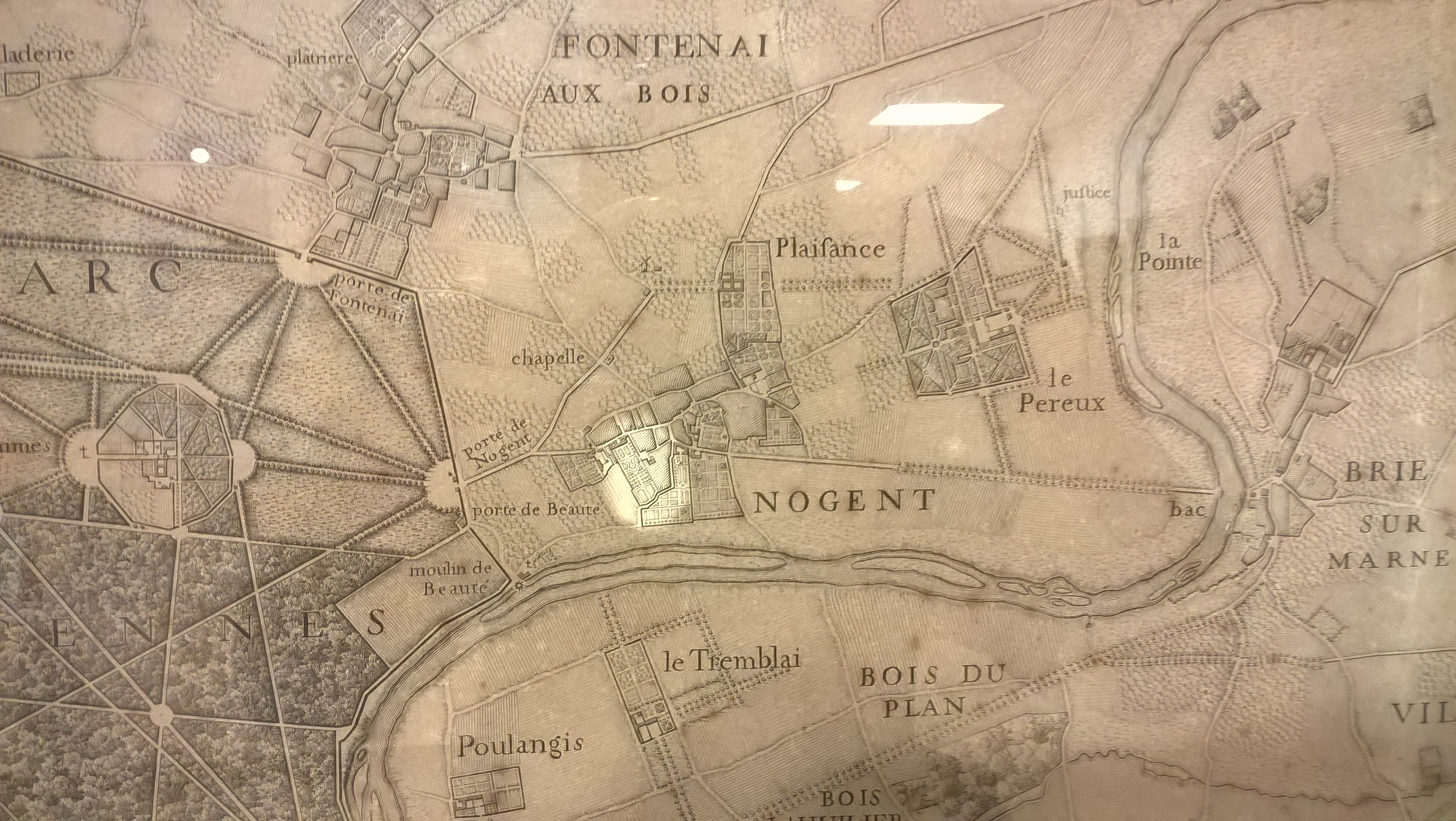 Détail d'une carte figurant la ville de Nogent-sur-Marne et de ses environs. Elle a été exécutée par l'abbé Jean Delagrive, en 1740. Cette carte est actuellement exposée au Musée de Nogent-sur-Marne.